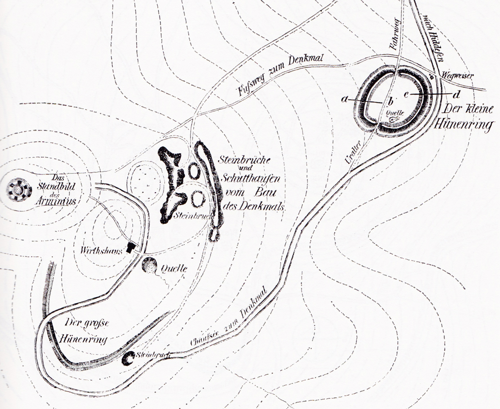 Lageplan der Grotenburg, Großer und Kleiner Hünenring (nach Ludwig Hölzermann 1830-1870)